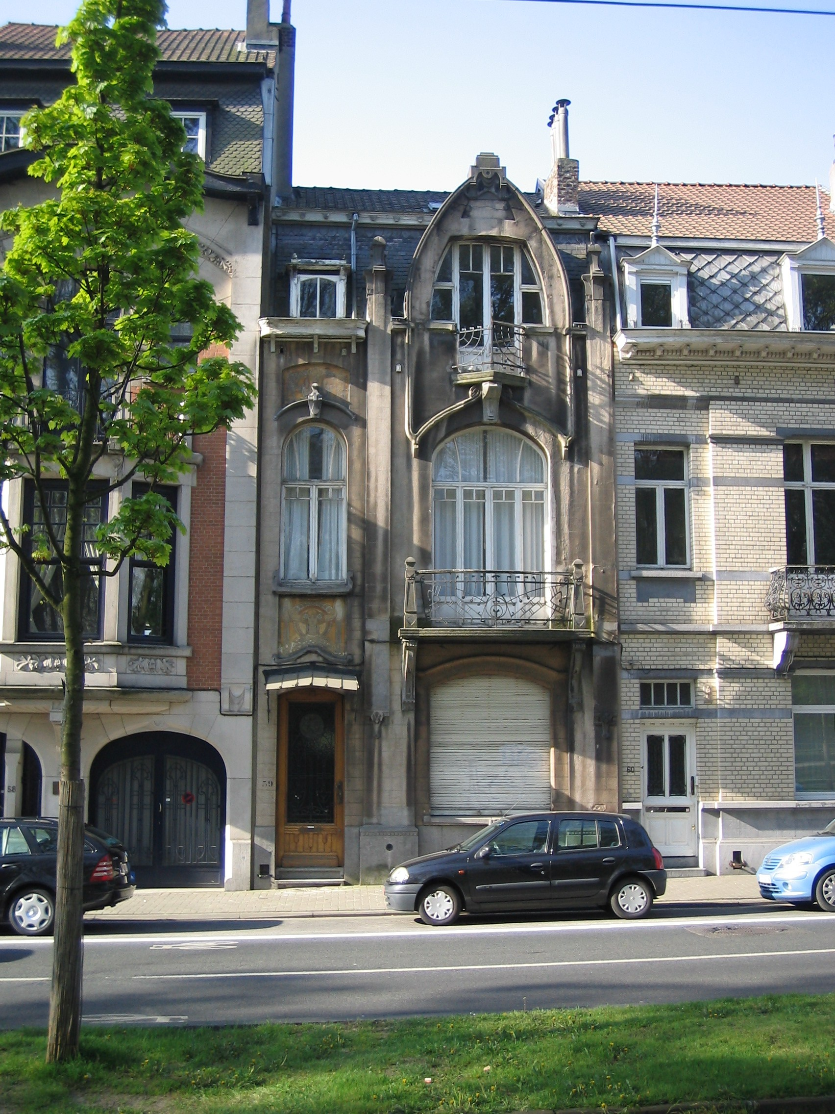 Maison de style Art nouveau au 59 avenue du Panthéon. Koekelberg.